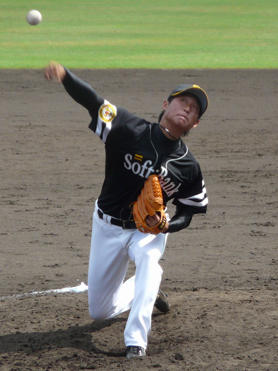 金無英